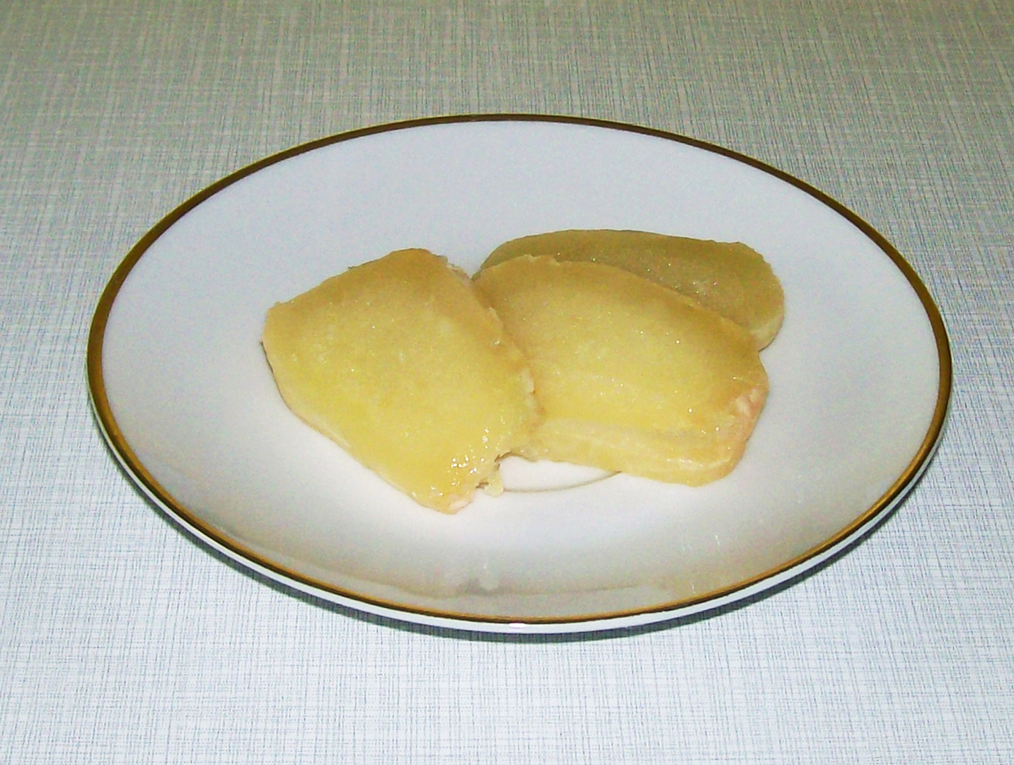 Ser domowy (Kochkäse). english: Hauskyjza